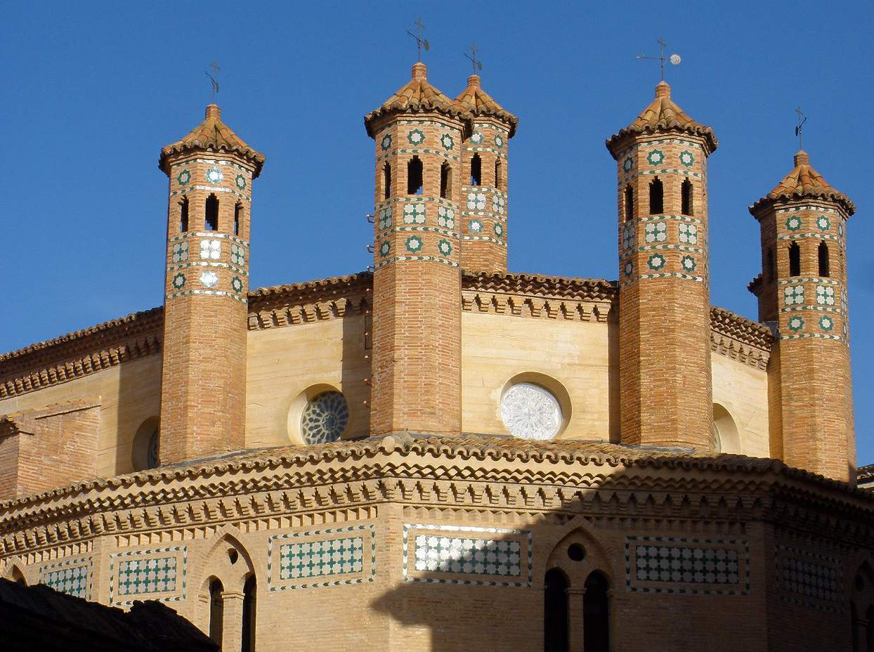 Iglesia de San Pedro, Teruel